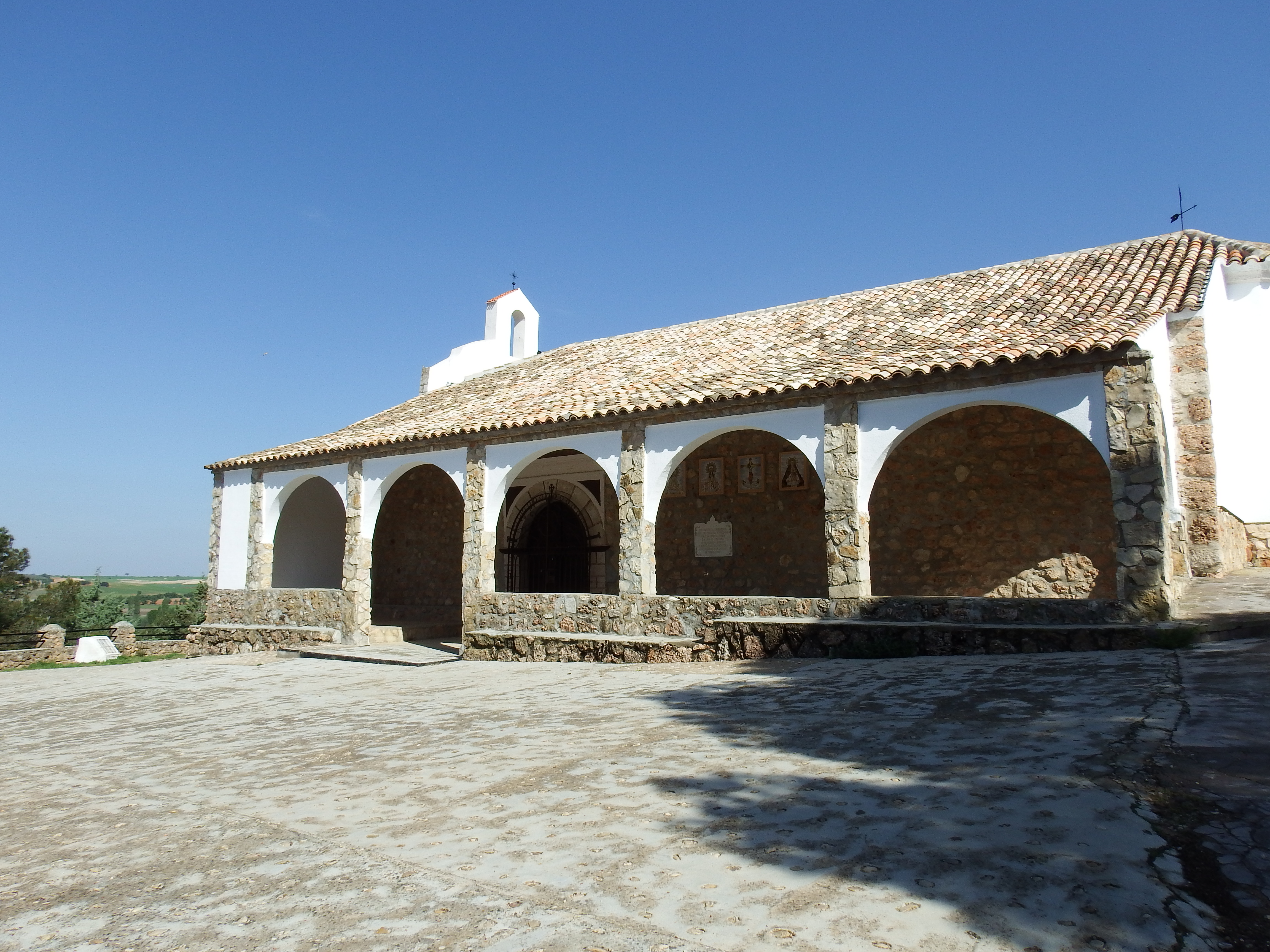 Fotos de Villamayor de Santiago tomadas en Wiki Takes Cuenca 2018